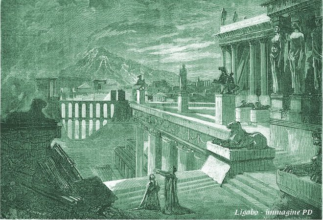 Ricostruzione immaginaria dell'antica città romana di Ercolano, pubblicata dal periodico francese Le Monde Illustré nel 1859